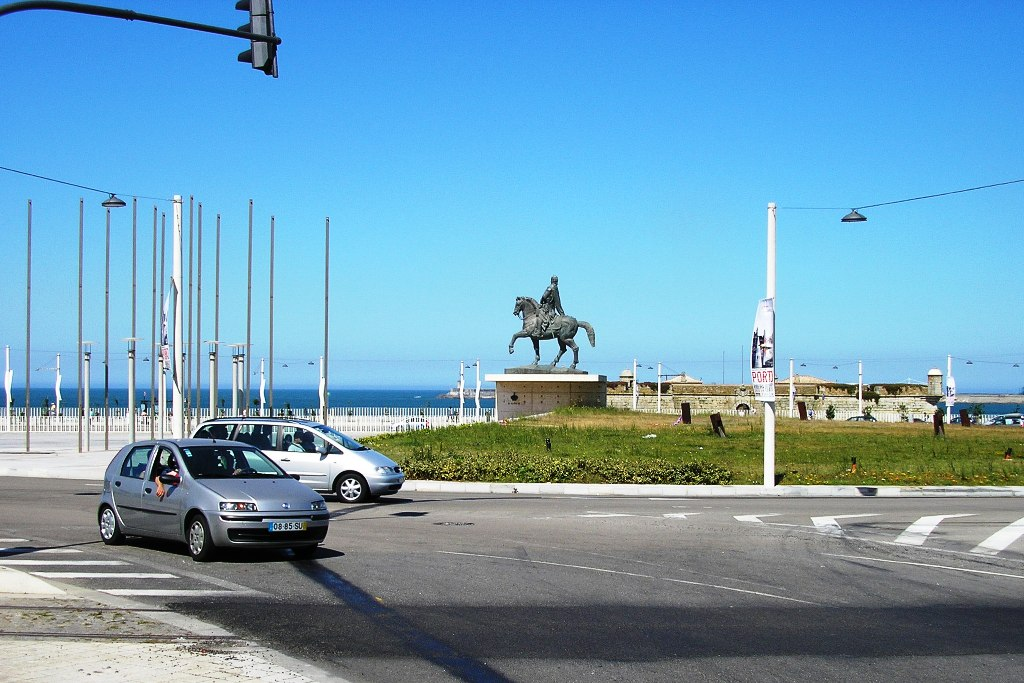 Gonçalves Zarco square in Porto, Portugal